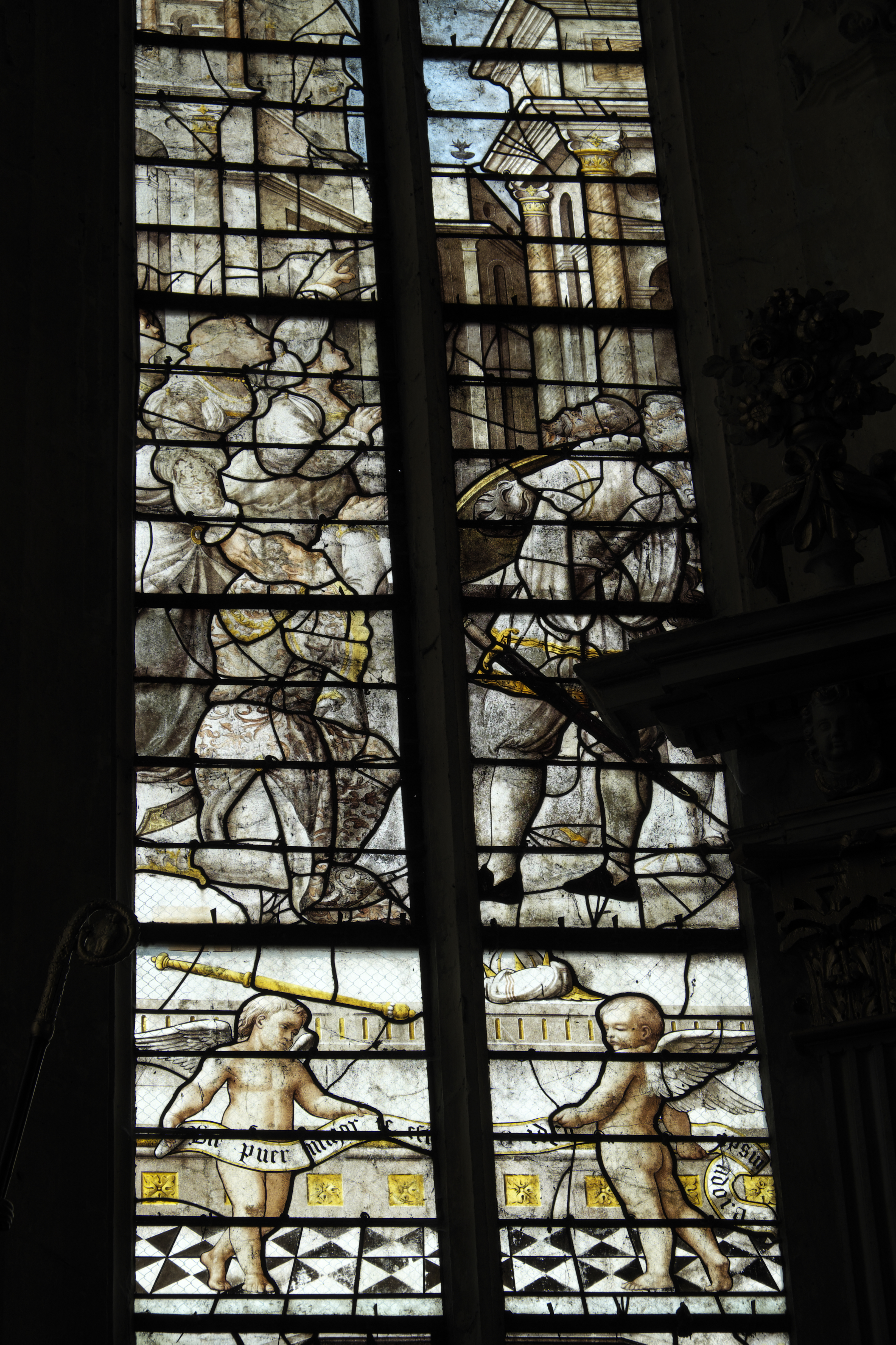 Katholische Kirche Saint-Georges in Chavanges im Département Aube (Champagne-Ardenne/Frankreich), Bleiglasfenster aus dem 16. Jahrhundert, Grisaillefenster; Darstellung: Vision des Augustus und der Tiburtinischen Sibylle (Ausschnitt unten) .